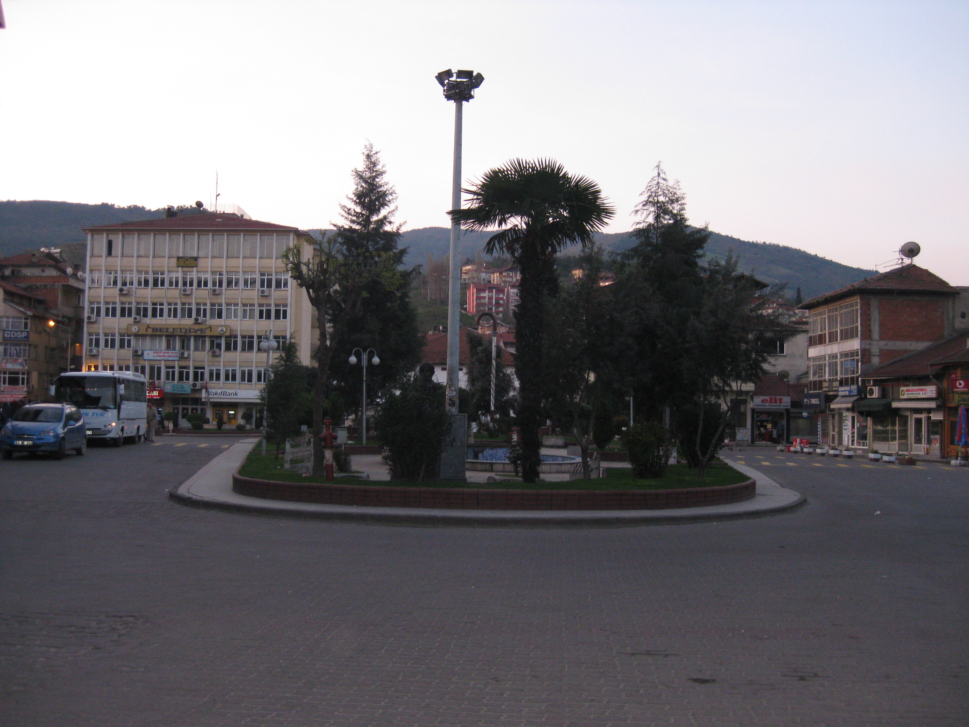 Devrek meydani